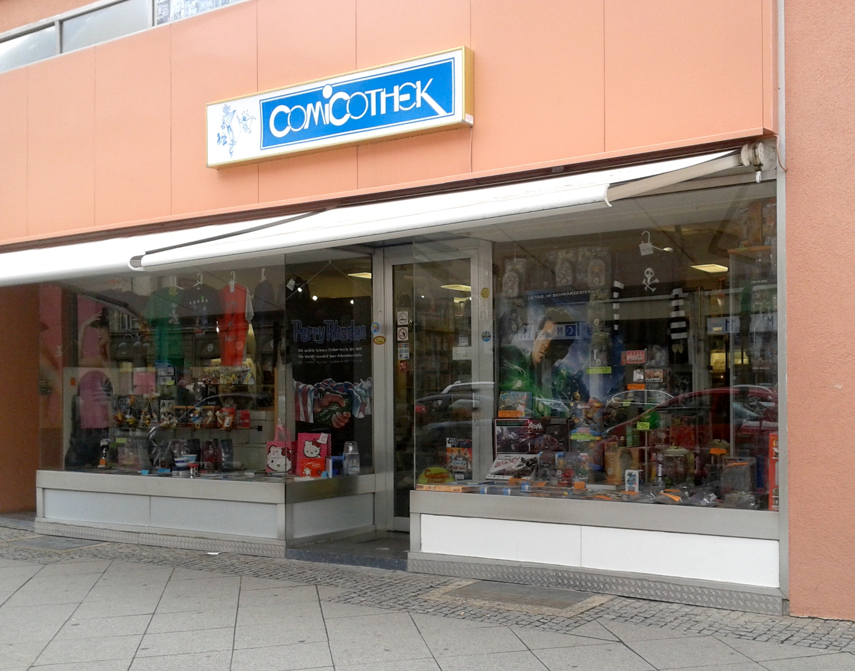 Der Comicladen COMICOTHEK in Mannheim, E3